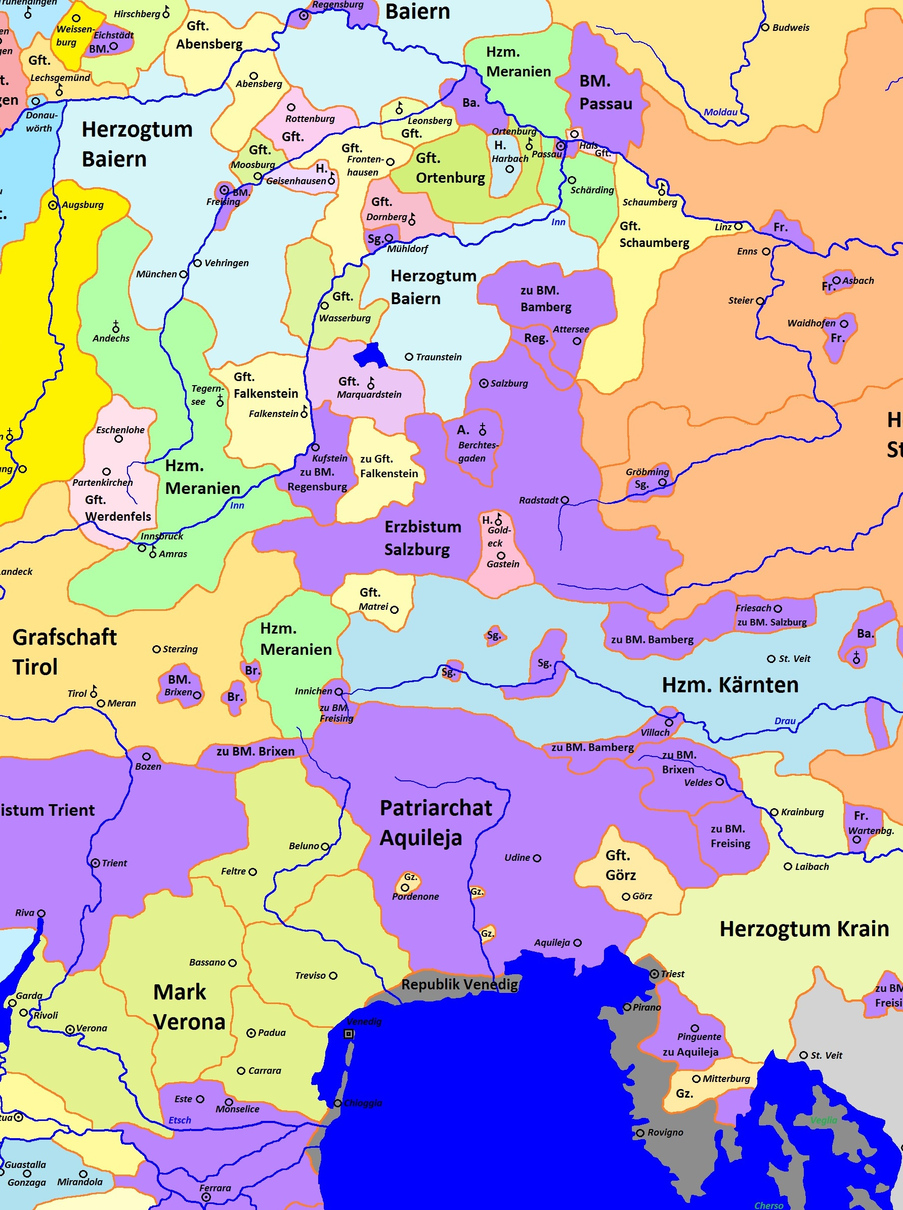 Heiliges Römisches Reich zur Zeit Kaiser Friedrichs II. um 1250